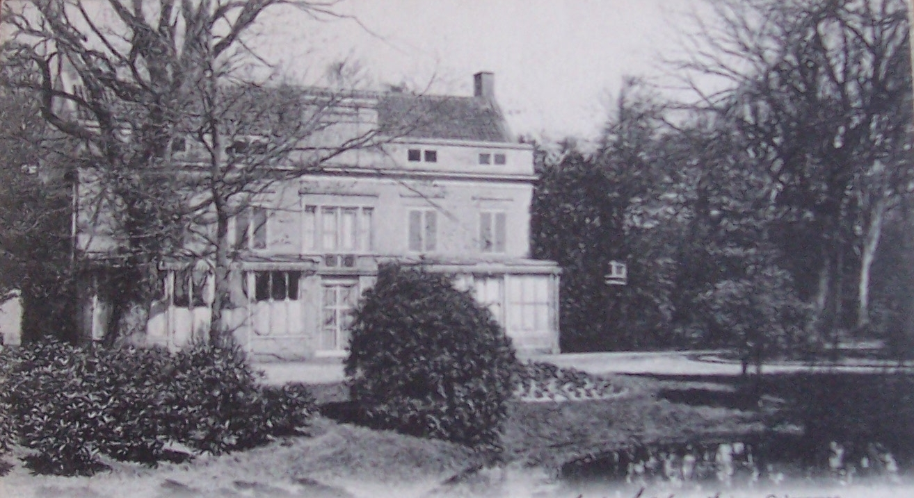 Huize Calorama, tuin en omgeving. ca 1902-1904.